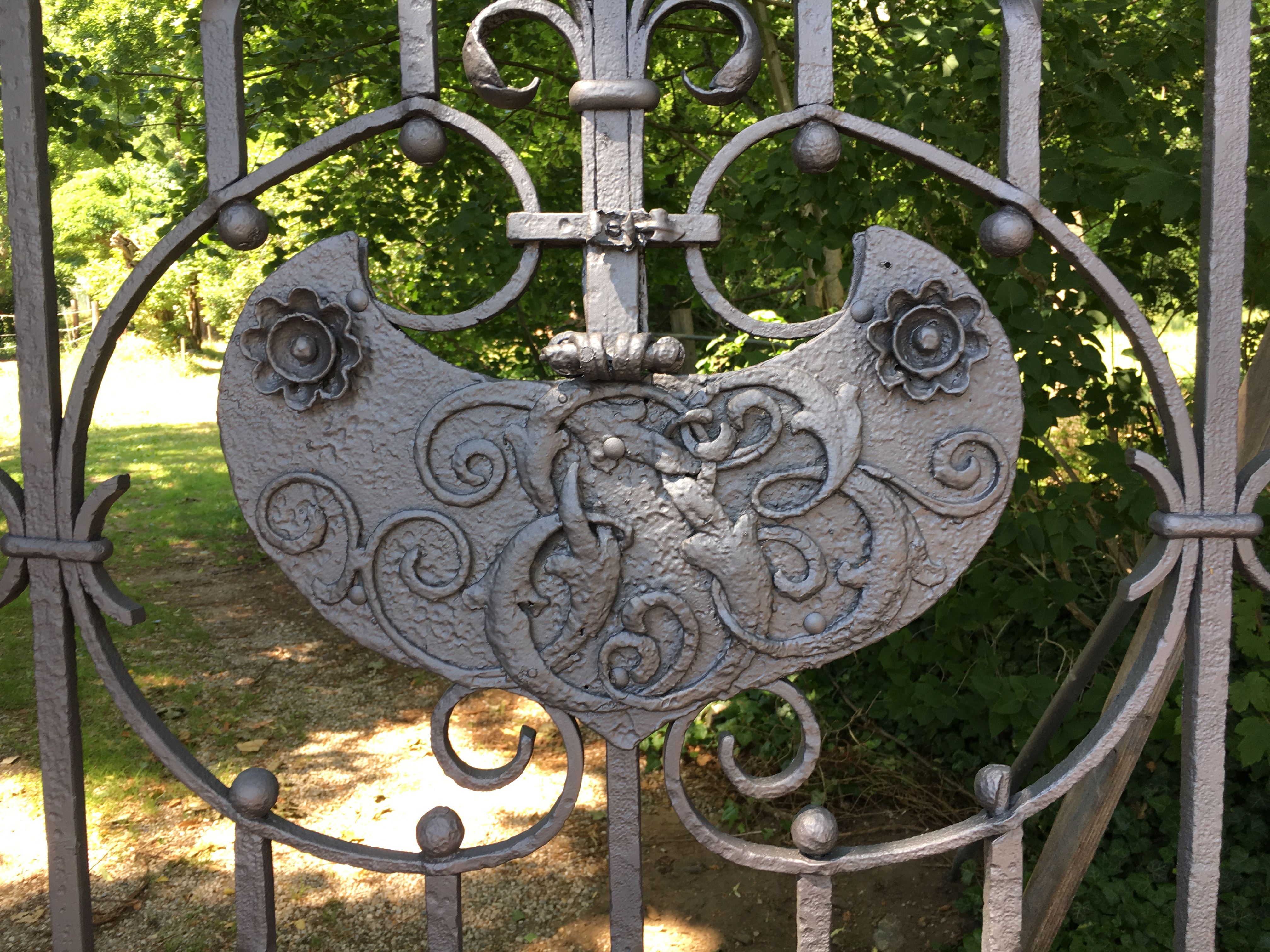 Radebeul Jägerberg gesamt Tor Monogramm (FEB für Friedrich Eduard Bilz)